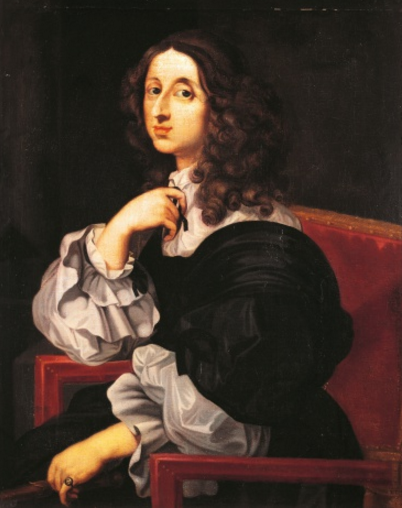 Cristina da Suécia (1626-1689)